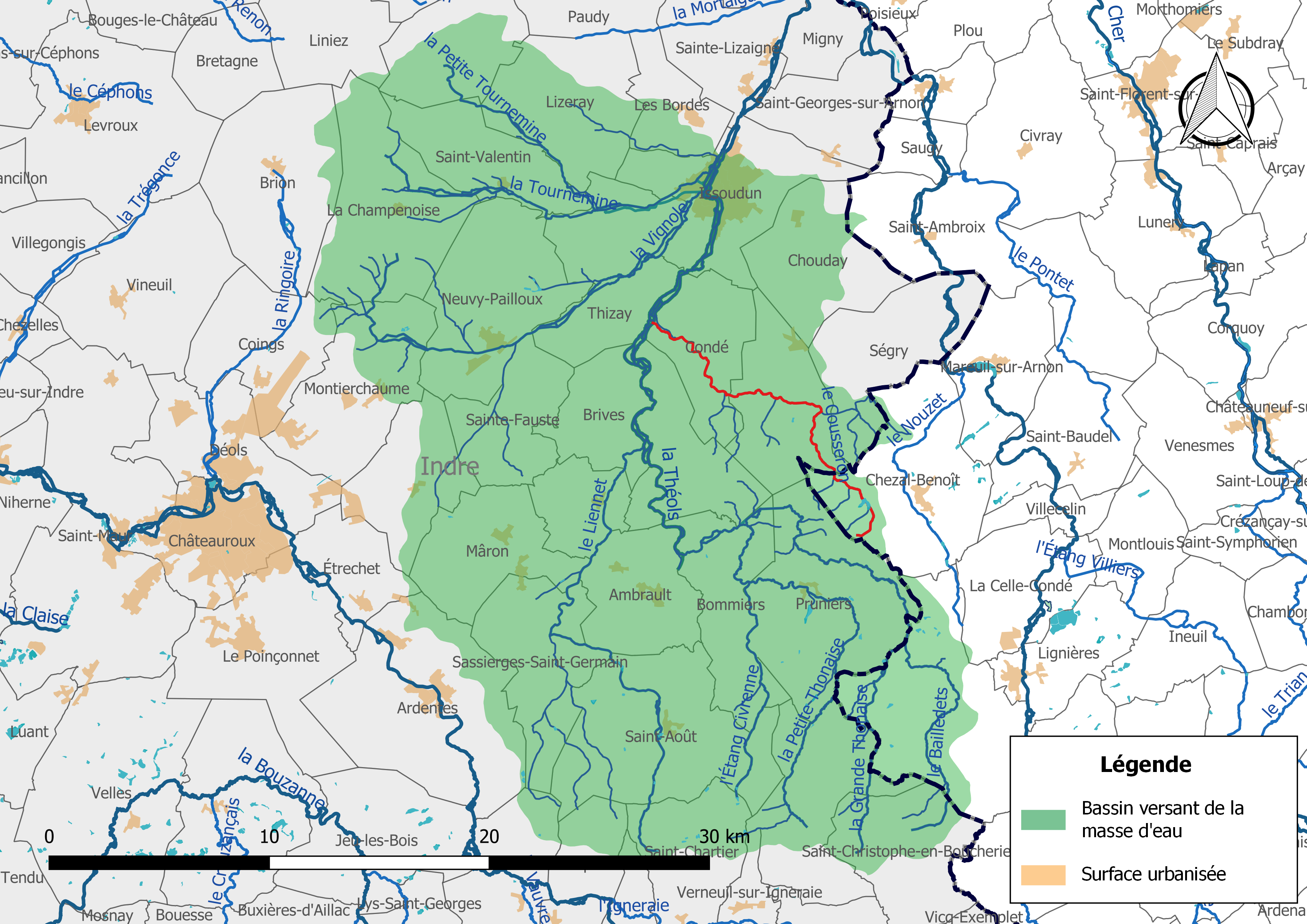 Carte de la masse d'eau « FRGR0340a », avec mise en exergue du cours d'eau « le Cousseron » (en rouge).